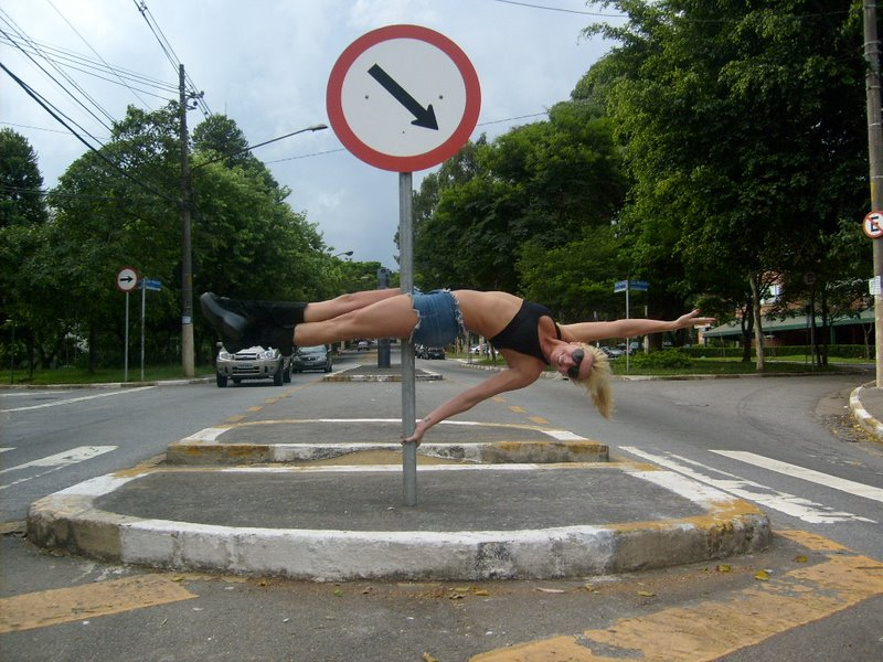 Pole dance street, realizado numa placa de trânsito